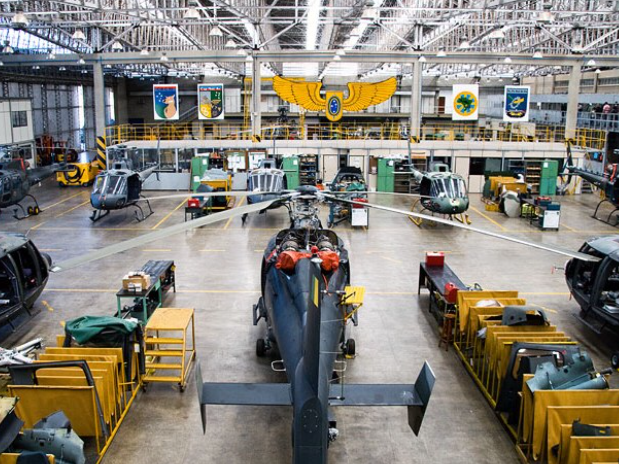 Linha de Manutenção de Aeronaves, AvEx, 2011.